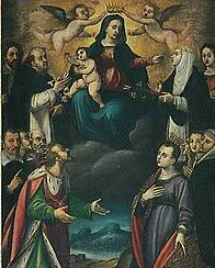 La Vergine del Rosario e Santi, dalla Chiesa dei Santi Quirico e Giulitta di Collesalvetti